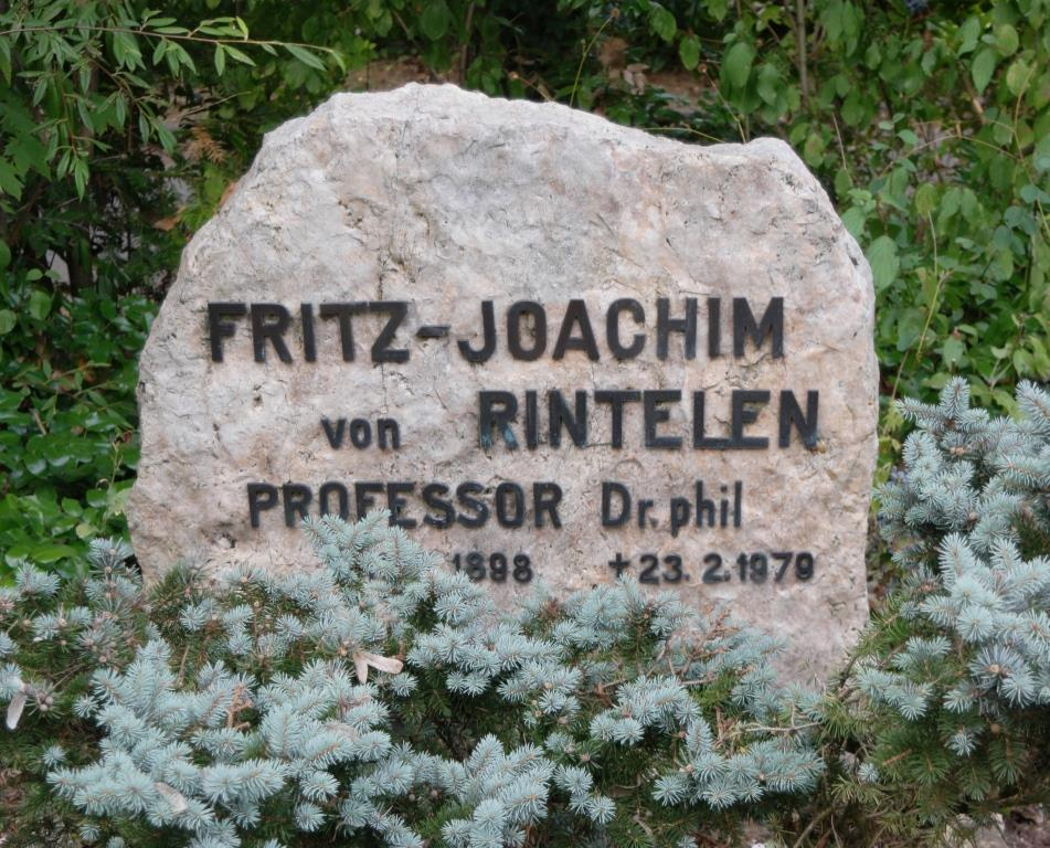 Grab des Philosophen Fritz-Joachim von Rintelen, 1898-1979, auf dem Hauptfriedhof Mainz